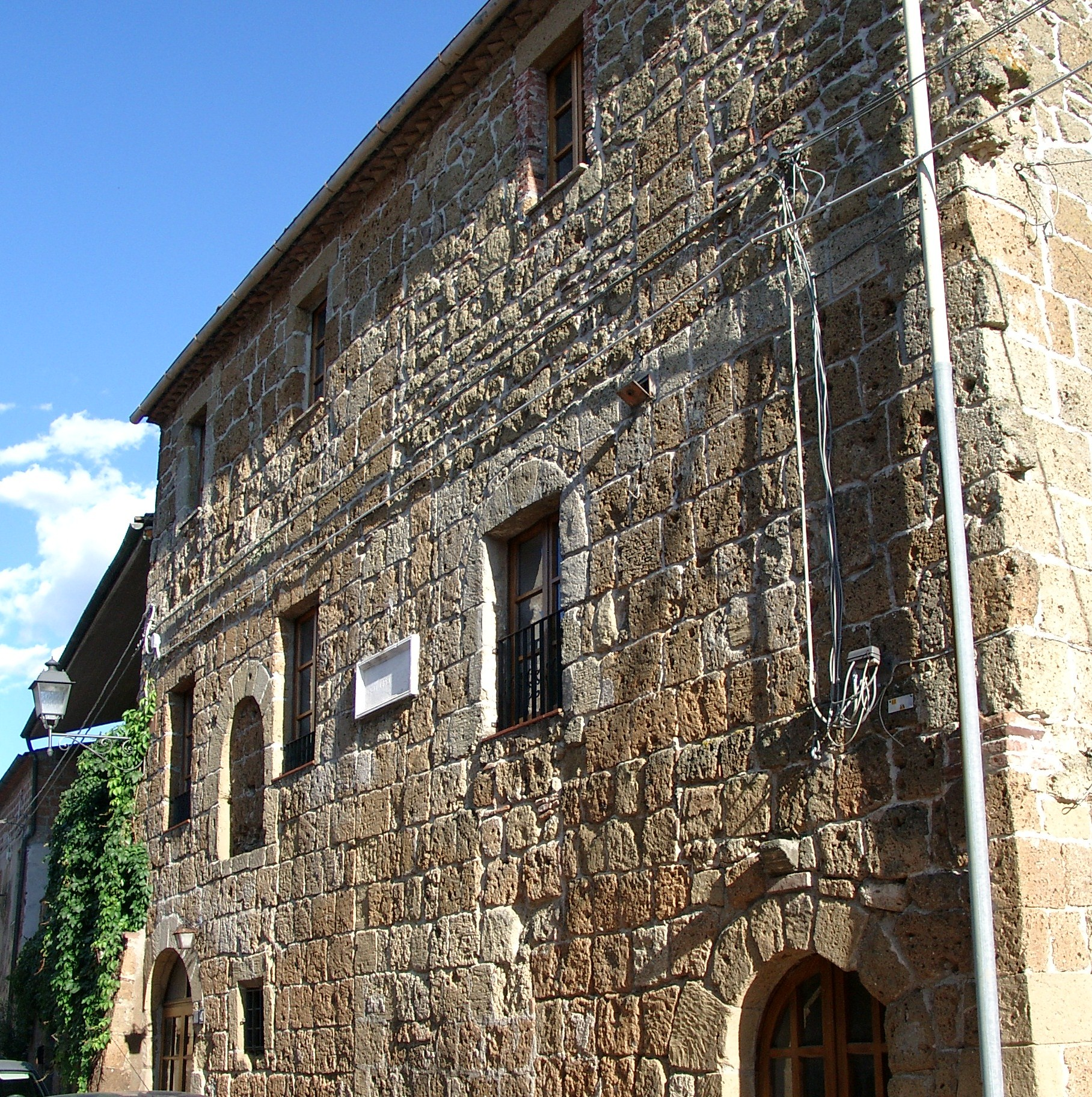 casa natale di Gregorio VII a Sovana, scattata 01 sept 2010.